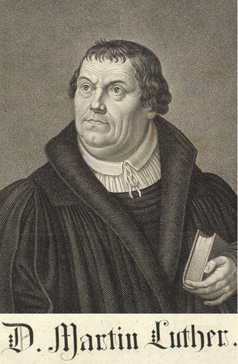 Martin Luther (magyarosan: Luther Márton, németül eredetileg Martin Luder) (Eisleben (ma Lutherstadt Eisleben), 1483. november 10. – Eisleben, 1546. február 18.) a protestáns reformáció szellemi atyja, lelkész, reformátor. Ágoston-rendi szerzetesként lett teológus és professzor, a wittenbergi egyetem bibliatanára.